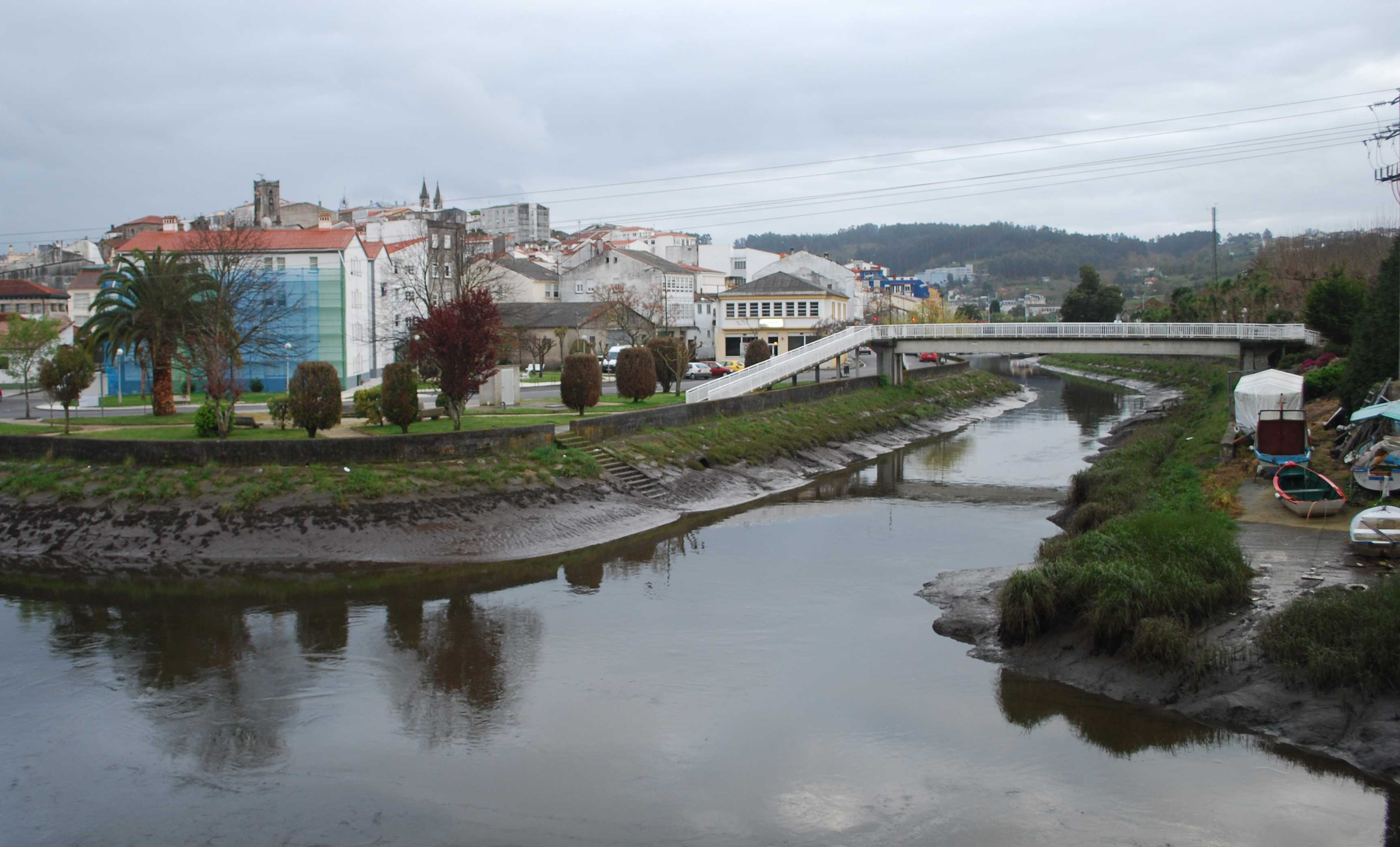 Desenbocadura do río Mendo xunto ao río Mandeo en Betanzos